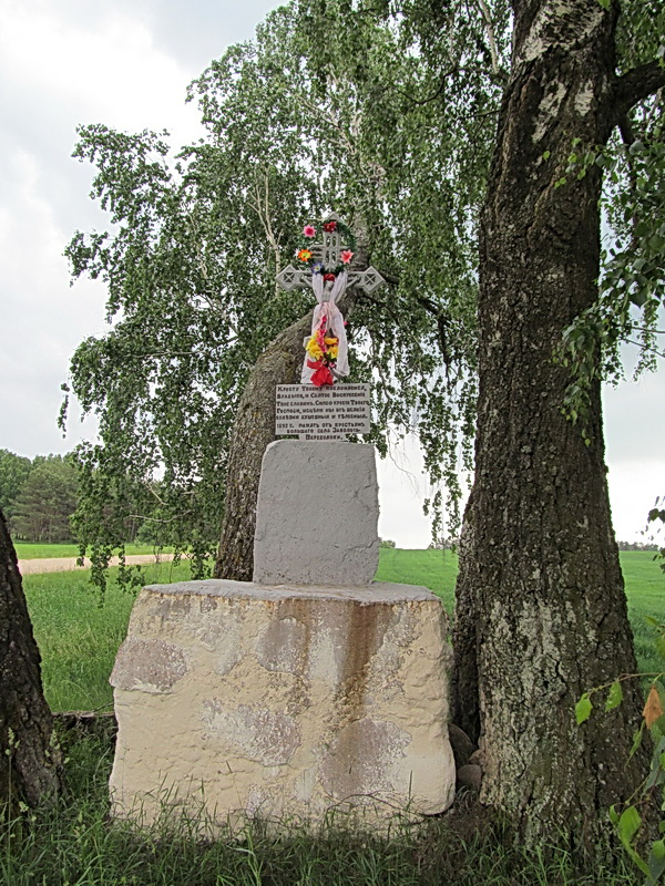 Старая Перавалока. Прыдарожны крыж-абярэг